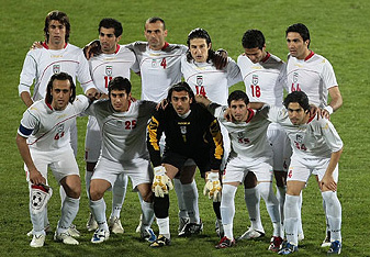 عکس تیمی؛ تیم ملی ایران در بازی با تایلند / ایران ۱ - تایلند ۰ / انتخابی جام ملت‌های آسیا ۲۰۱۱ / اسفند ۱۳۸۸